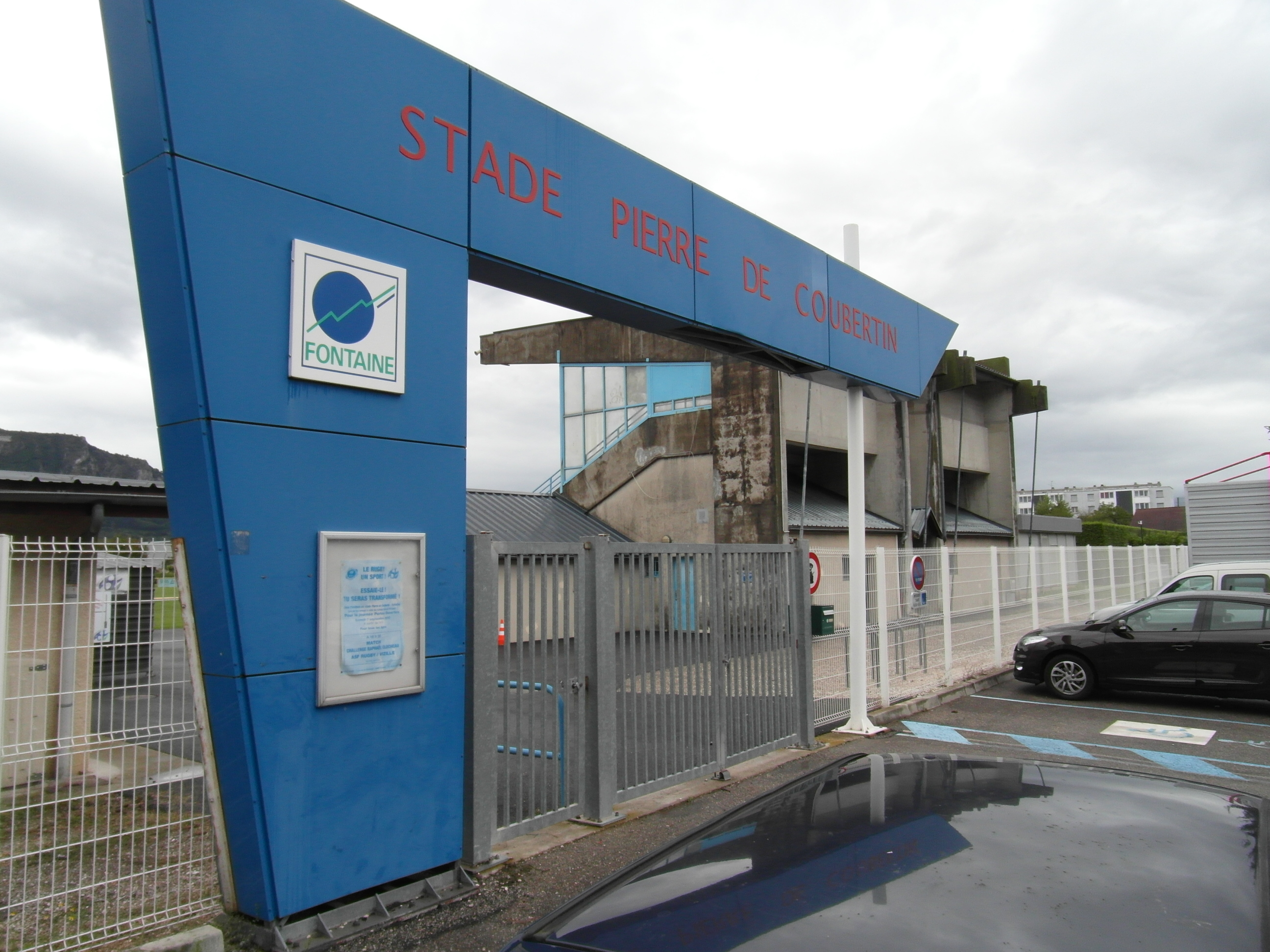 Stade Pierre de Courbertin